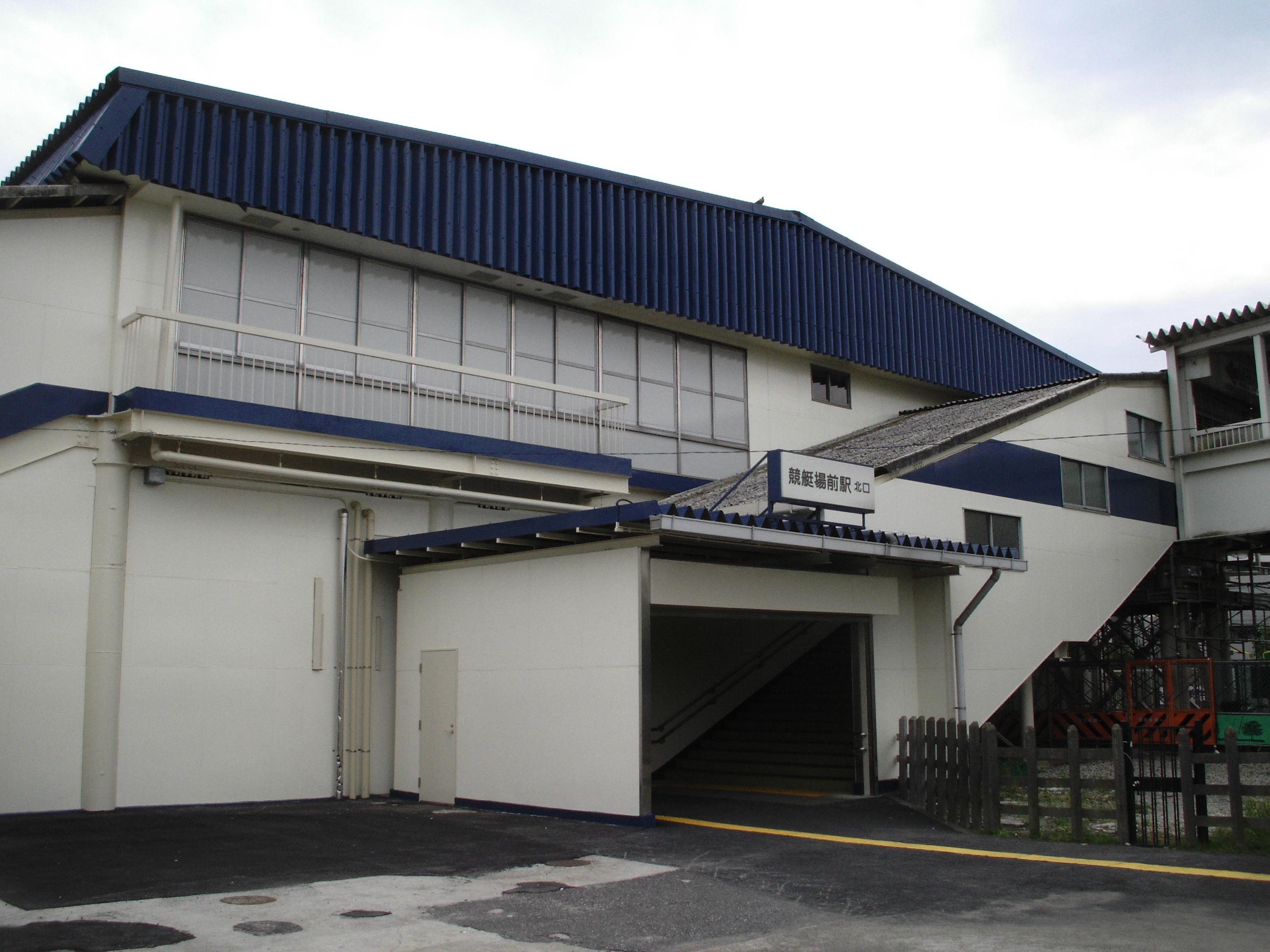 競艇場前駅